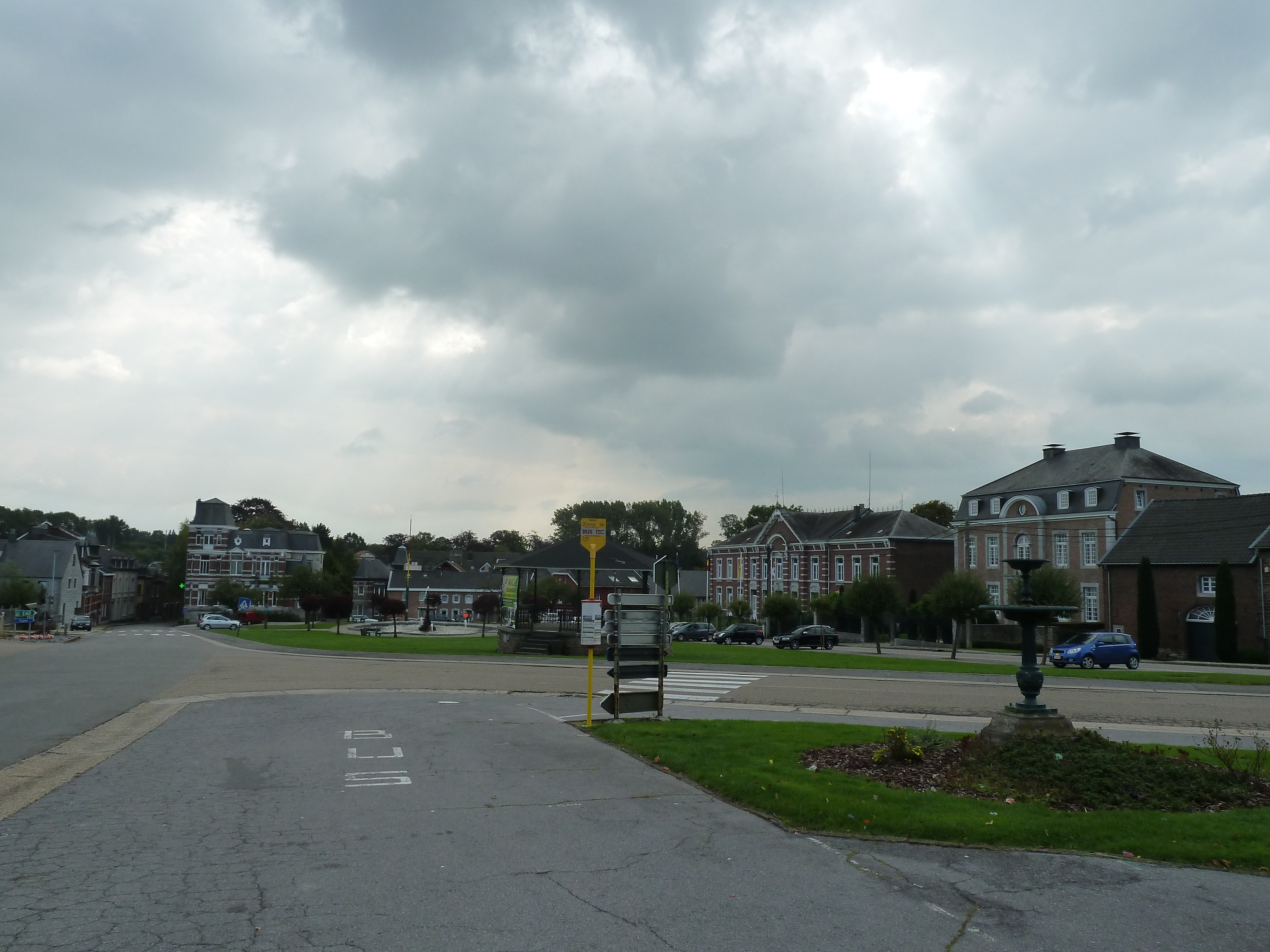 Place Communale, Plombières, Belgique